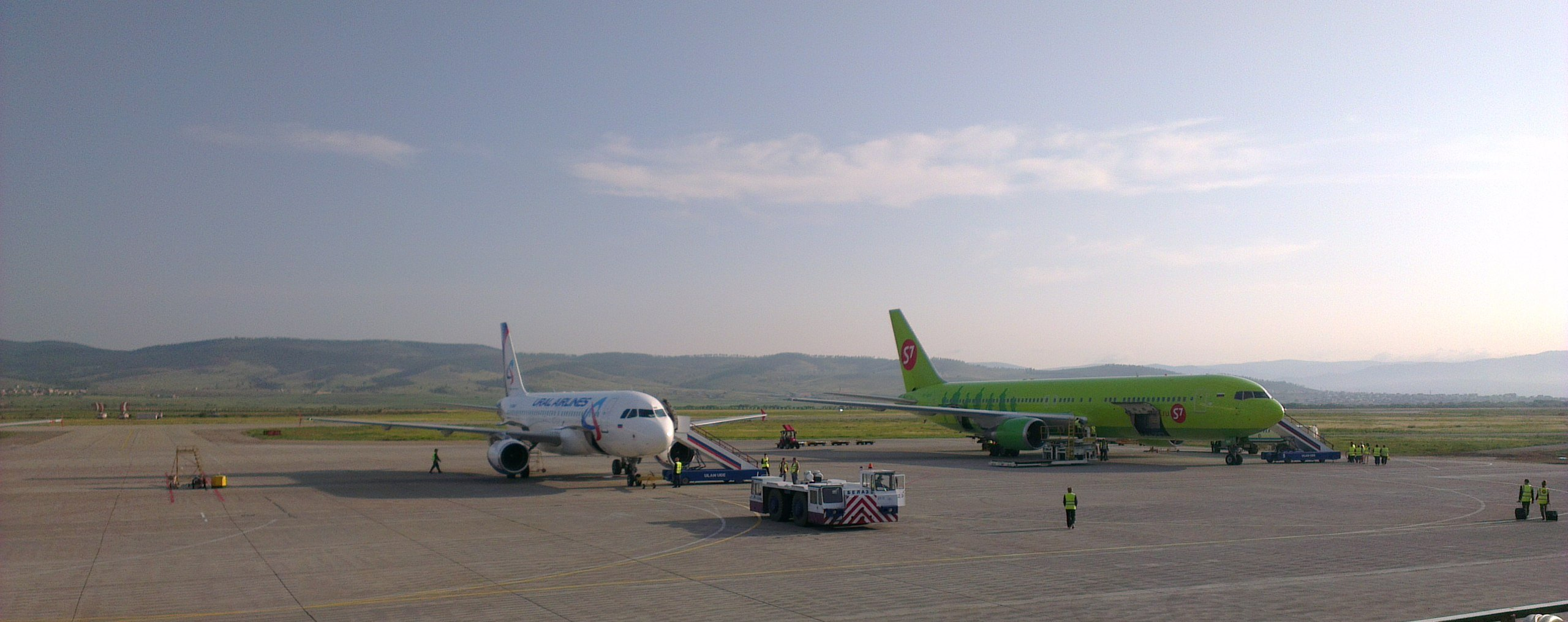 Обслуживание самолетов авиакомпаний Уральских Авиалиний и S7 Airlines (Глобус)